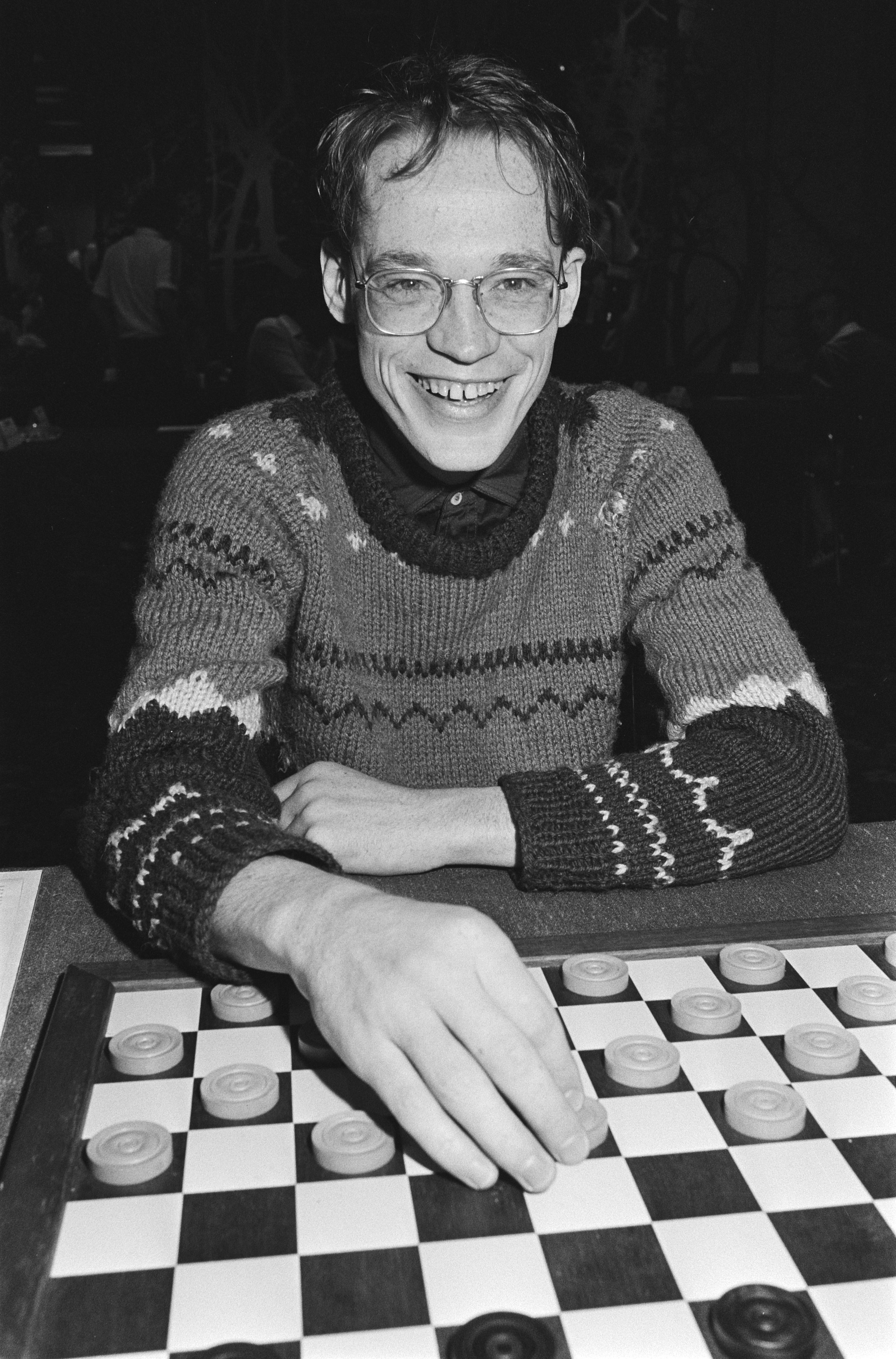 Collectie / Archief : Fotocollectie Anefo Reportage / Serie : Dam-achtkamp in Amsterdam Beschrijving : Jannes van der Wal Datum : 4 juli 1983 Locatie : Amsterdam, Noord-Holland Trefwoorden : dammen, portretten, wedstrijden Persoonsnaam : Wal, Jannes van der Fotograaf : Antonisse, Marcel / Anefo Auteursrechthebbende : Nationaal Archief Materiaalsoort : Negatief (zwart/wit) Nummer archiefinventaris : bekijk toegang 2.24.01.05 Bestanddeelnummer : 932-6408